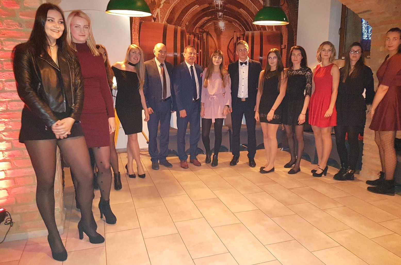 Wigilia w Spójni Stargard, siatkarki (20.12.2018)